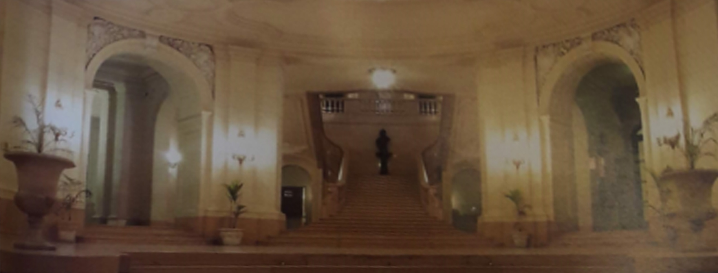 Hall de Legislatura de Gobierno de Buenos Aires